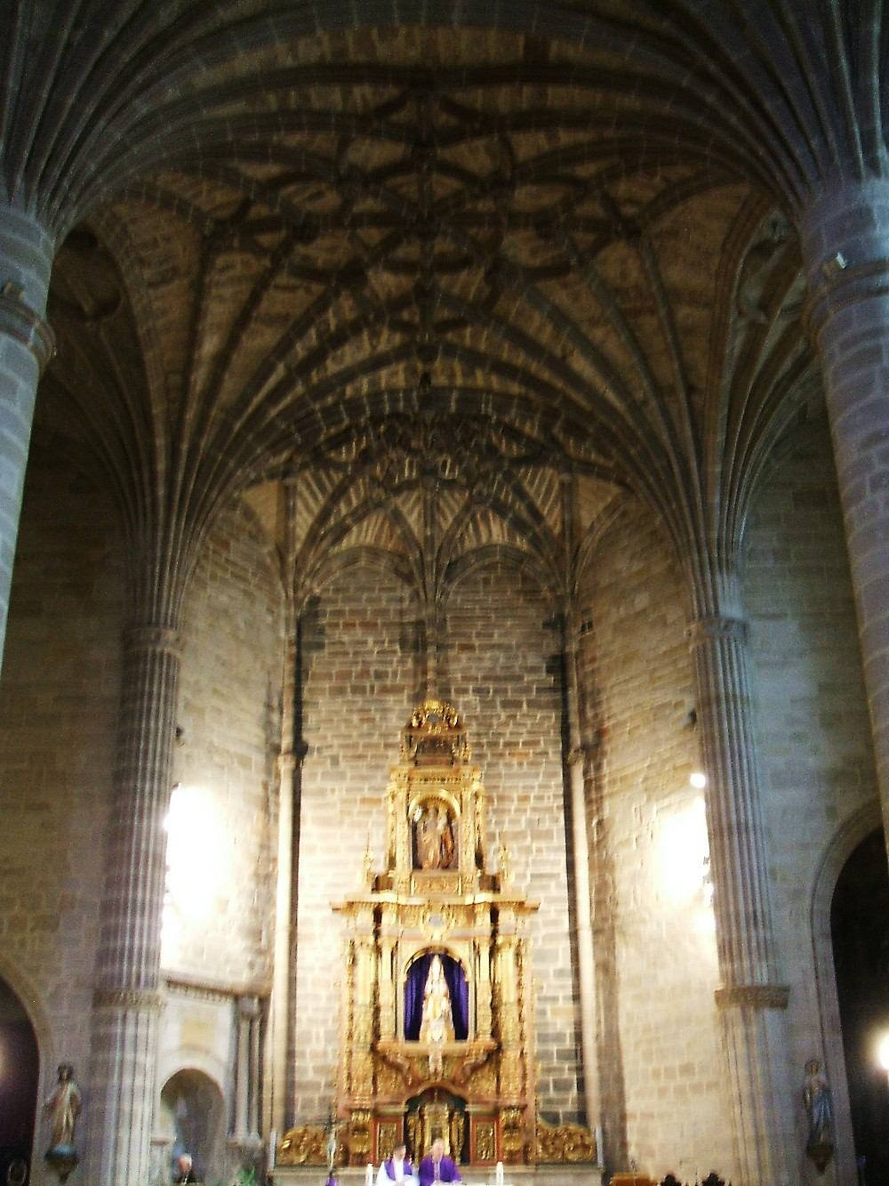 Cabecera de la Iglesia de Santa María de Altamira, Miranda de Ebro, Burgos, España/Spain